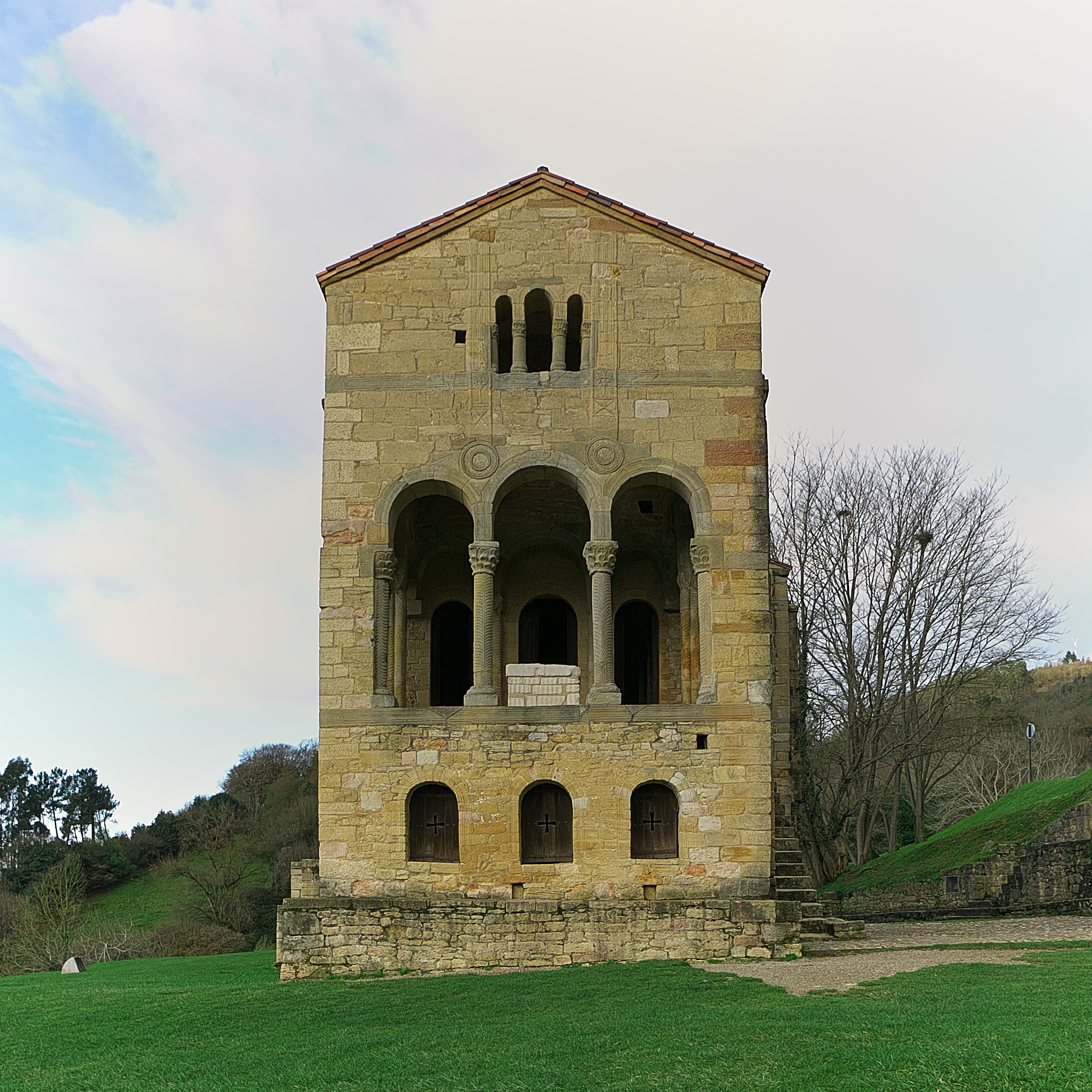 Fachada oriental de Santa María del Naranco. Ramiro I manda construir (848) su Aula Regia en las cercanías de Oviedo. Edificio único en su estilo arquitectónico, recopilador de las mejores técnicas constructivas, con referencias al arte carolingio y elementos del arte oriental bizantino, destacada verticalidad y armonía, y proyectado por un excepcional maestro.